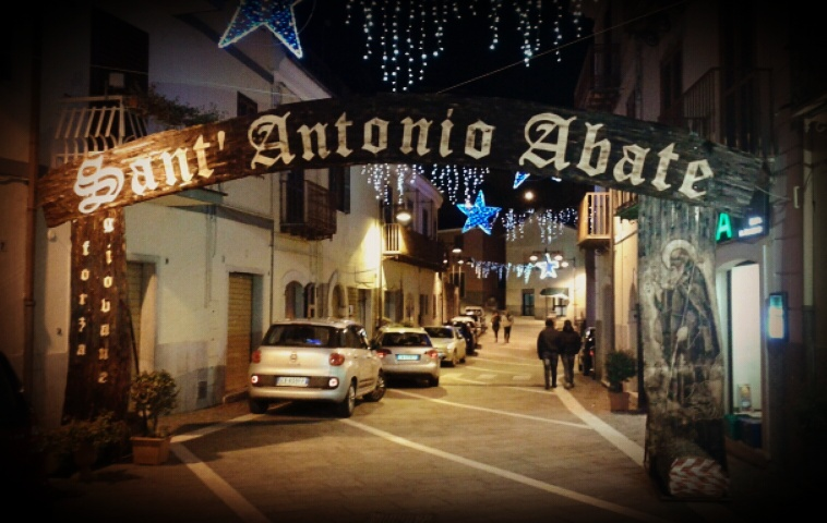 Descrizione: Sant'Antonio Abate a Colli Data: 16 gennaio 2016 Fonte: Opera propria Autore: Tremebondo89